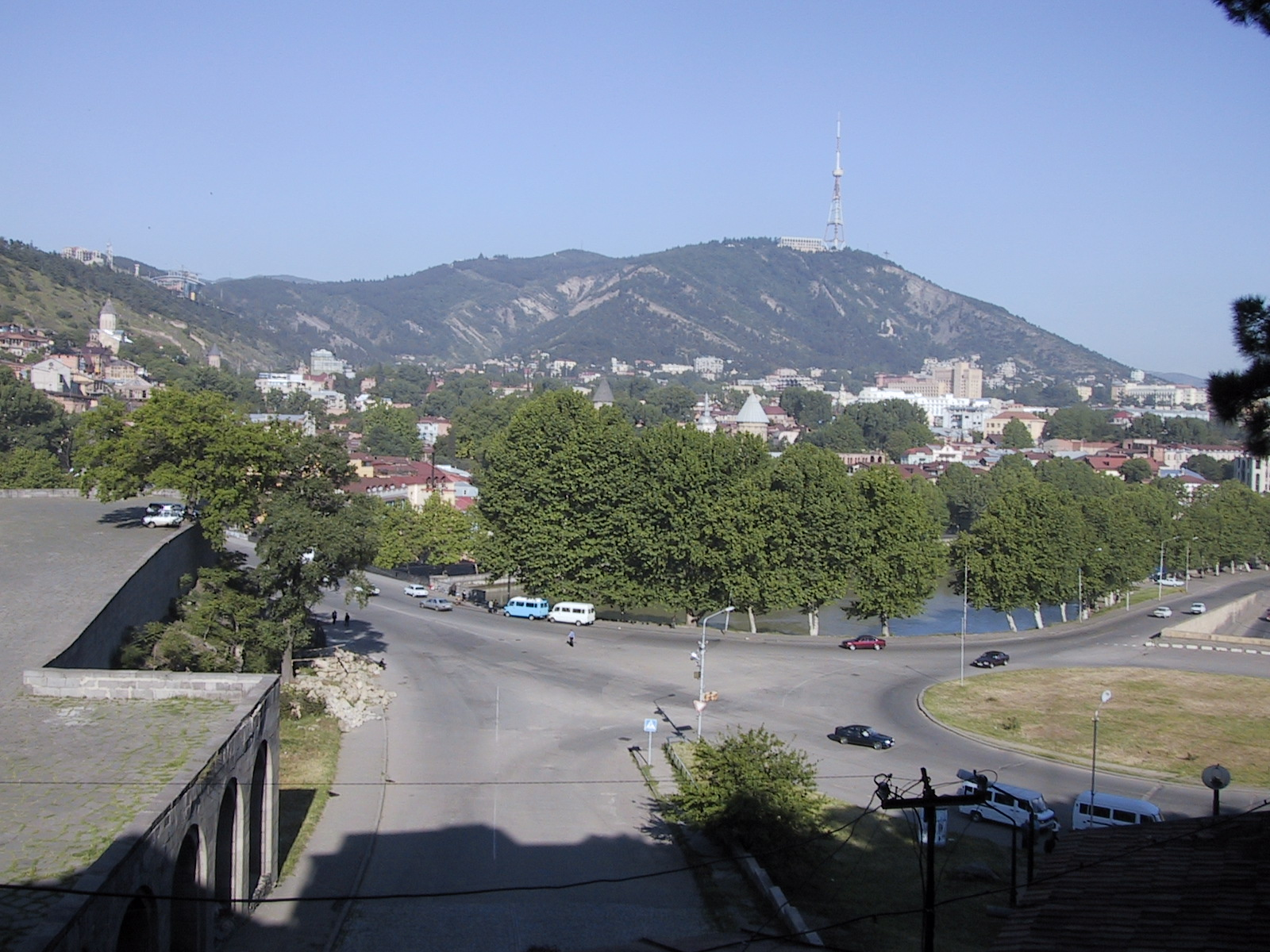 Tbilisi